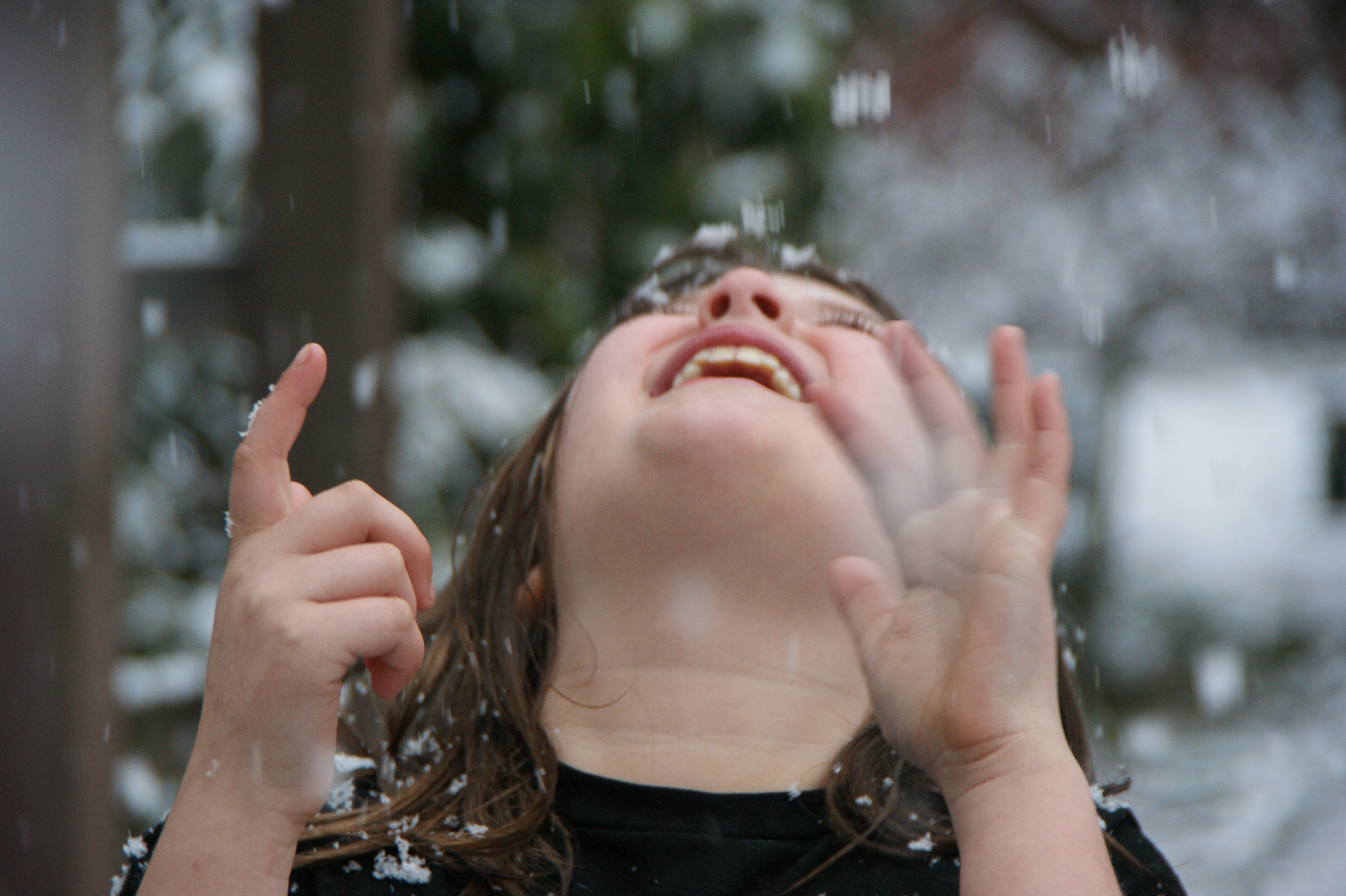 supreme happiness